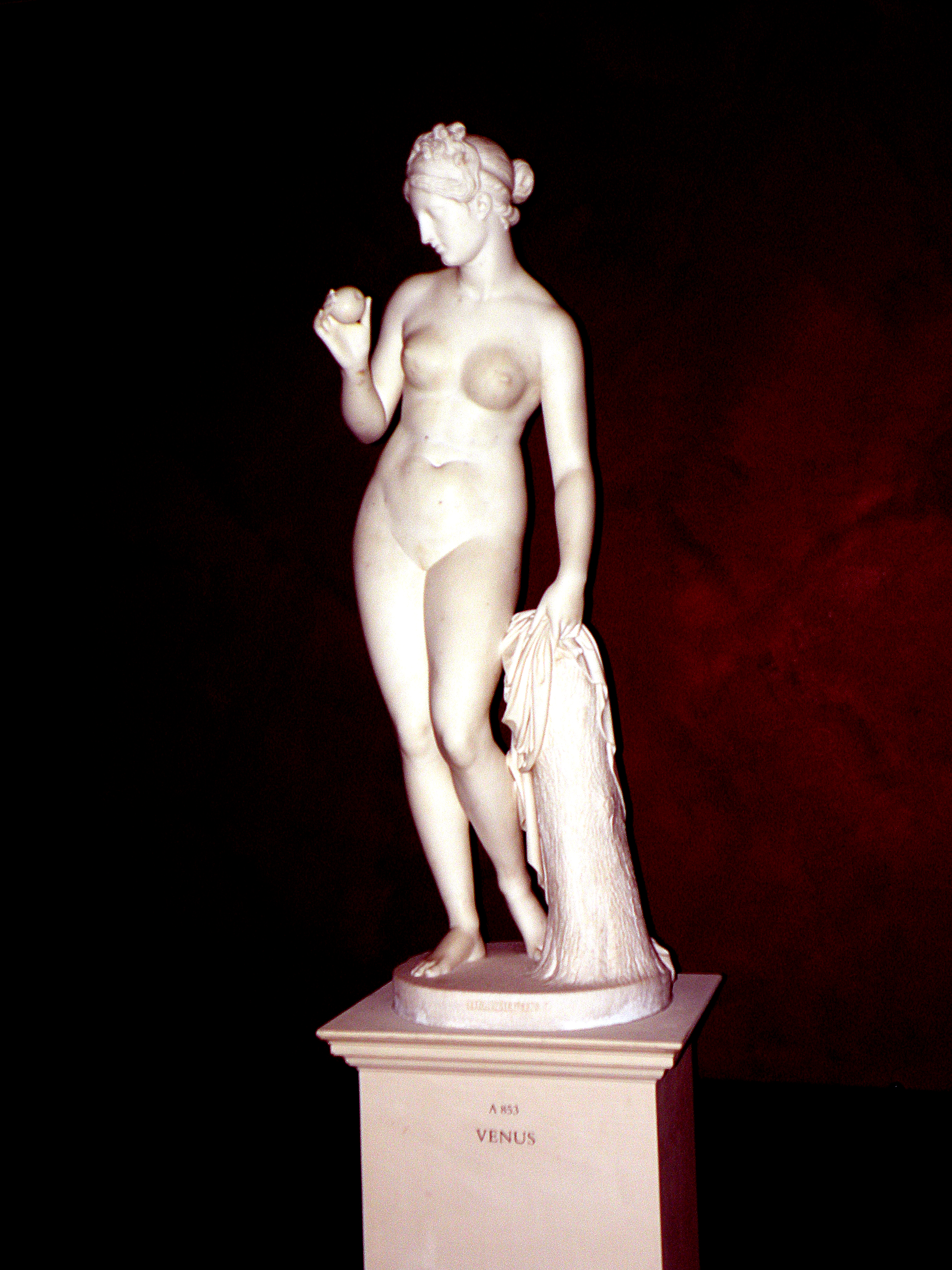 Bertel Thorvaldsen.Venus/Thorvaldsen museum.Copenhagen.